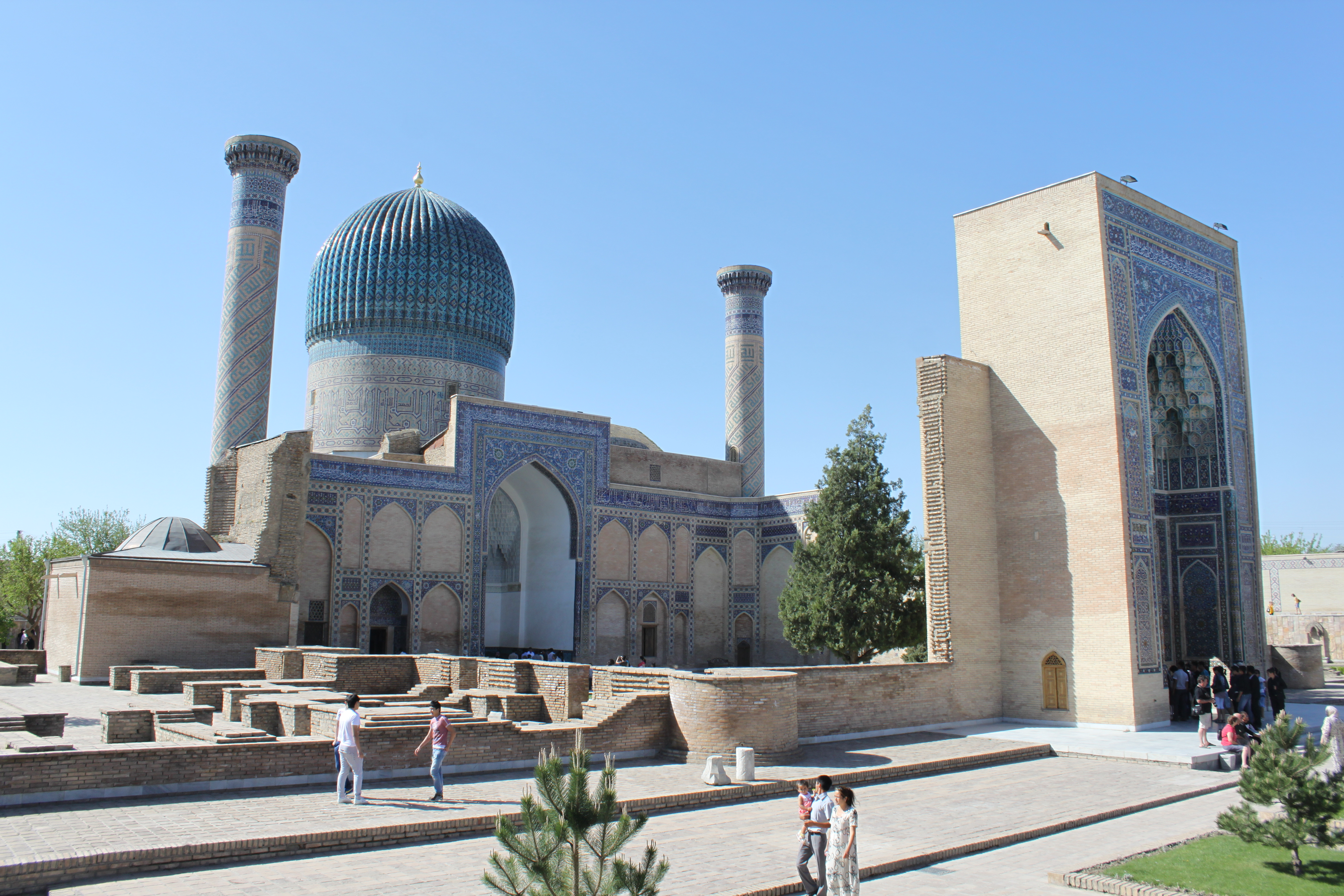 Extérieur de Gour Emir